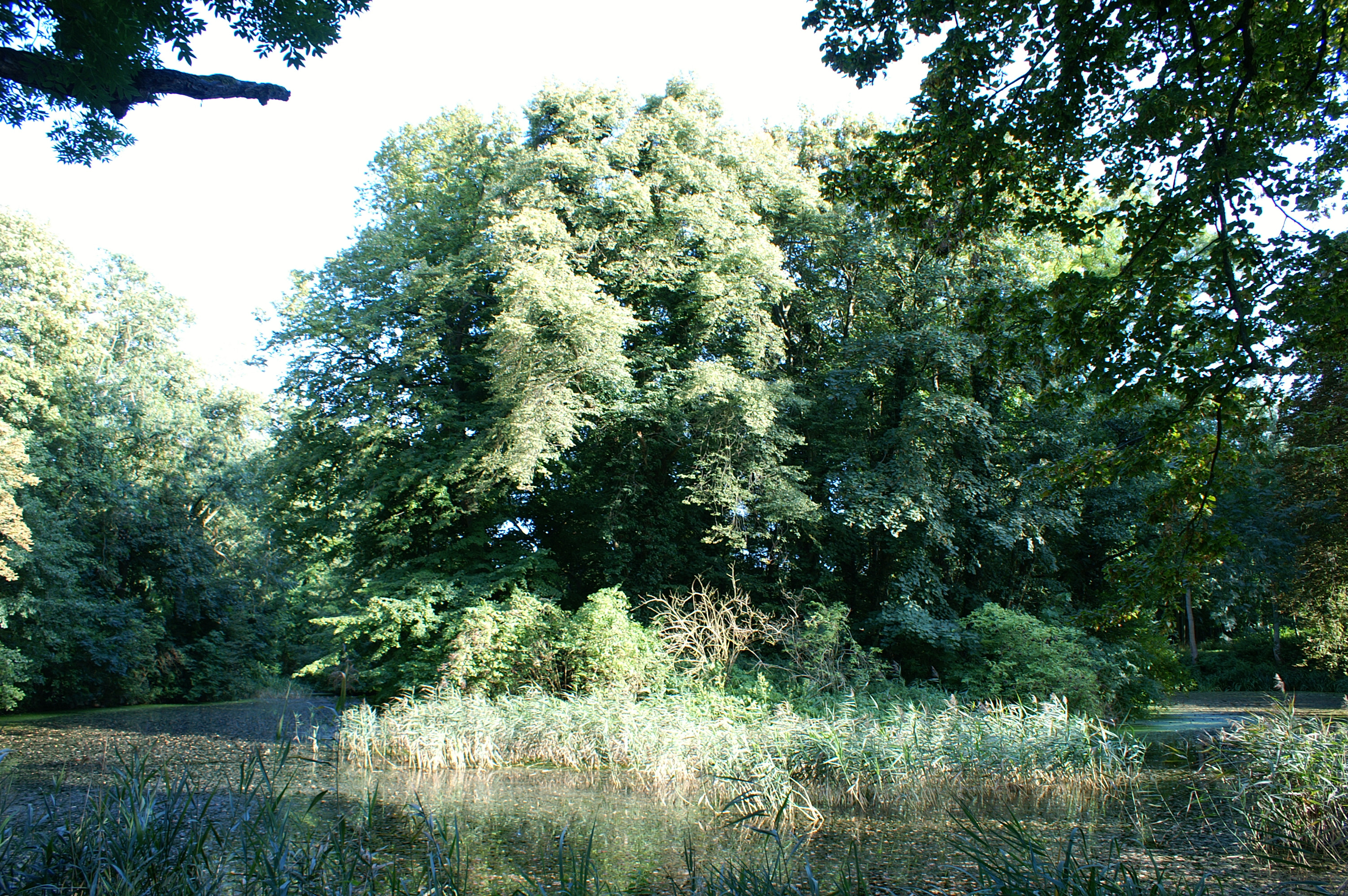 Klevenow, Park von Burg Klevenow, Insel im Teich